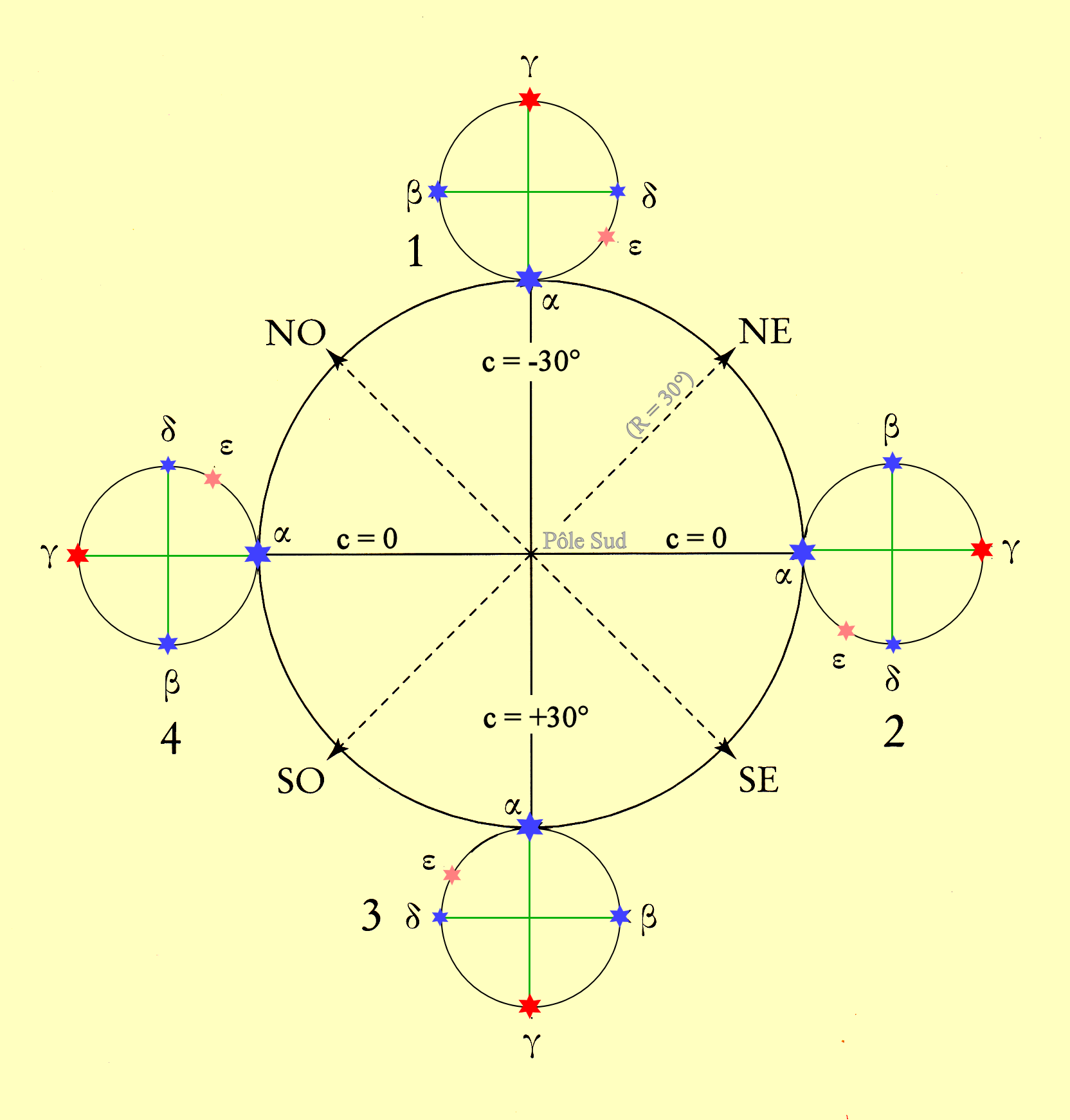 Régiment de la Croix du Sud : corrections à apporter en latitude suivant la position de la Croix dans ses positions cardinales (1514).